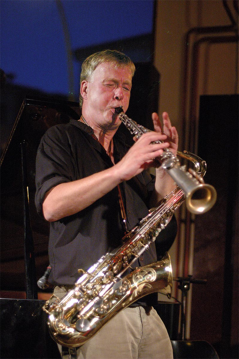 Thomas Borgmann @ Ruf der Heimat, b-flat, Berlin, 25.7.2006